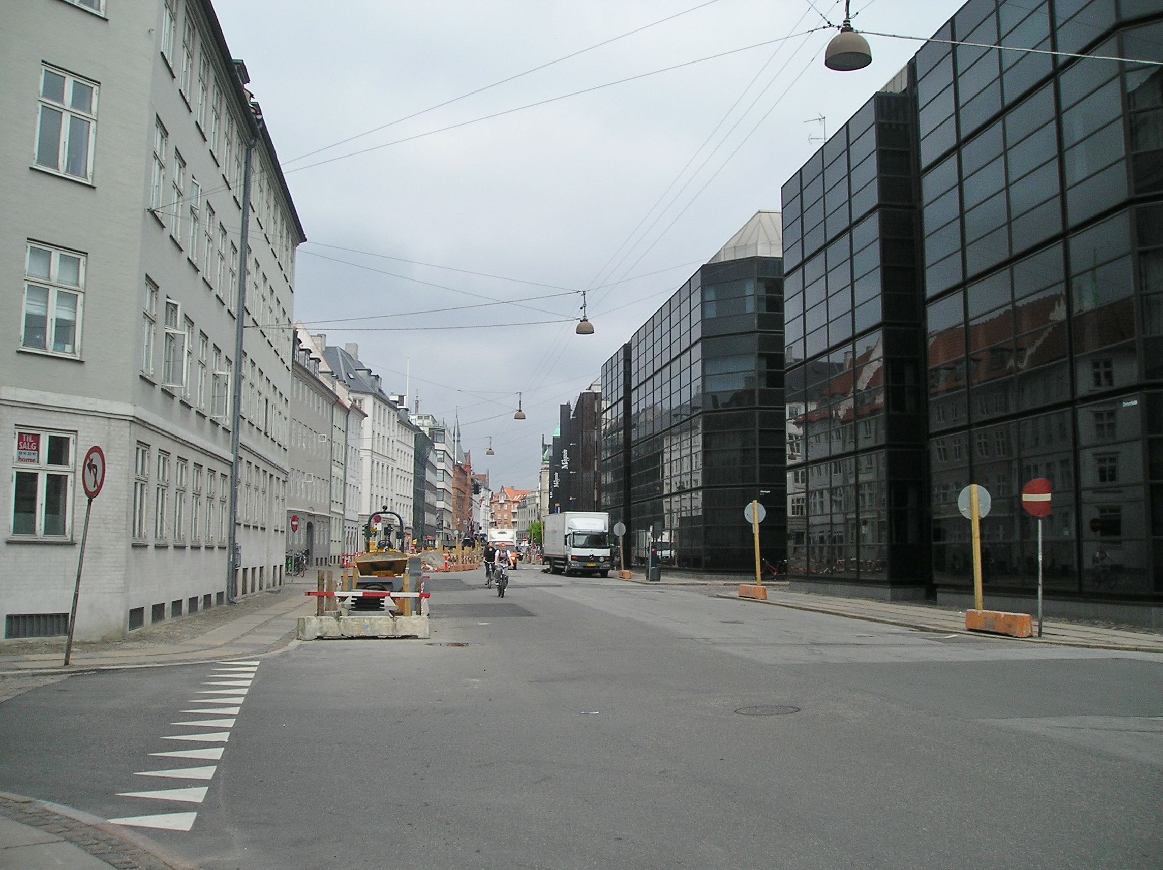 The street Bremerholm in Copenhagen.